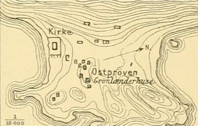 Plan topographique du site archéologique d'Herjolfsnes.